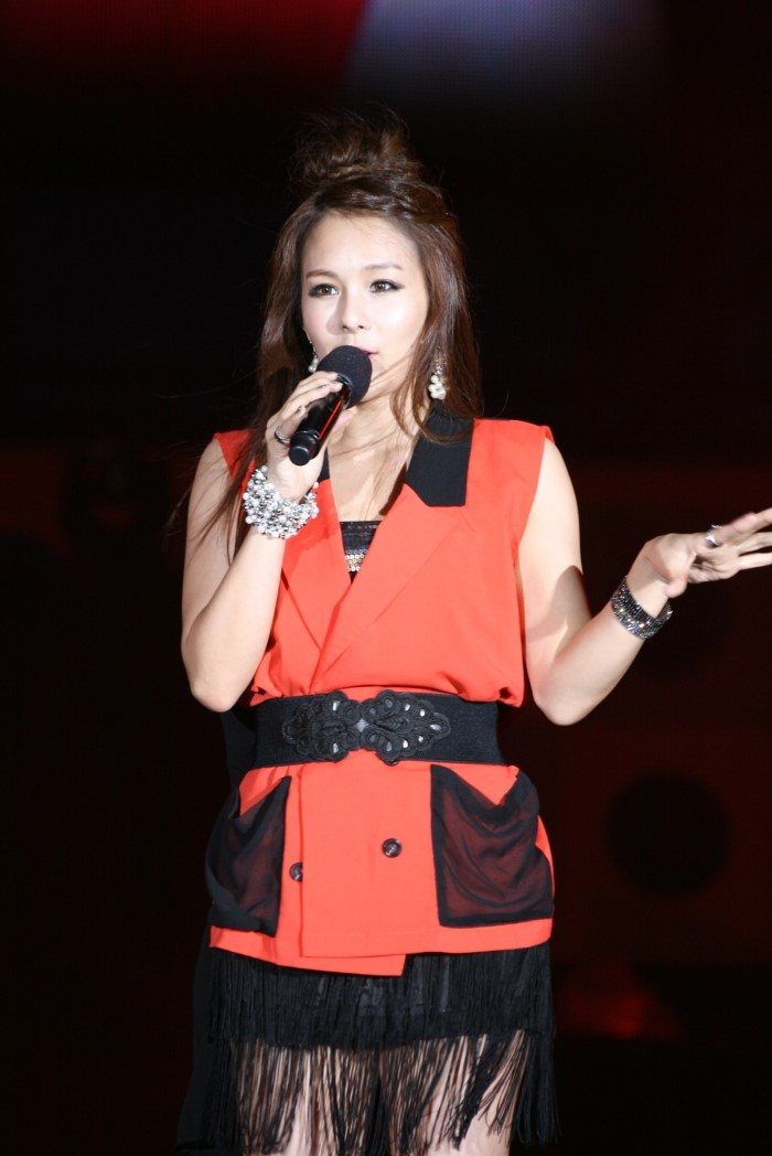 조선말: 2012년 7월 2일 여수 팝페스티벌에서 채연.